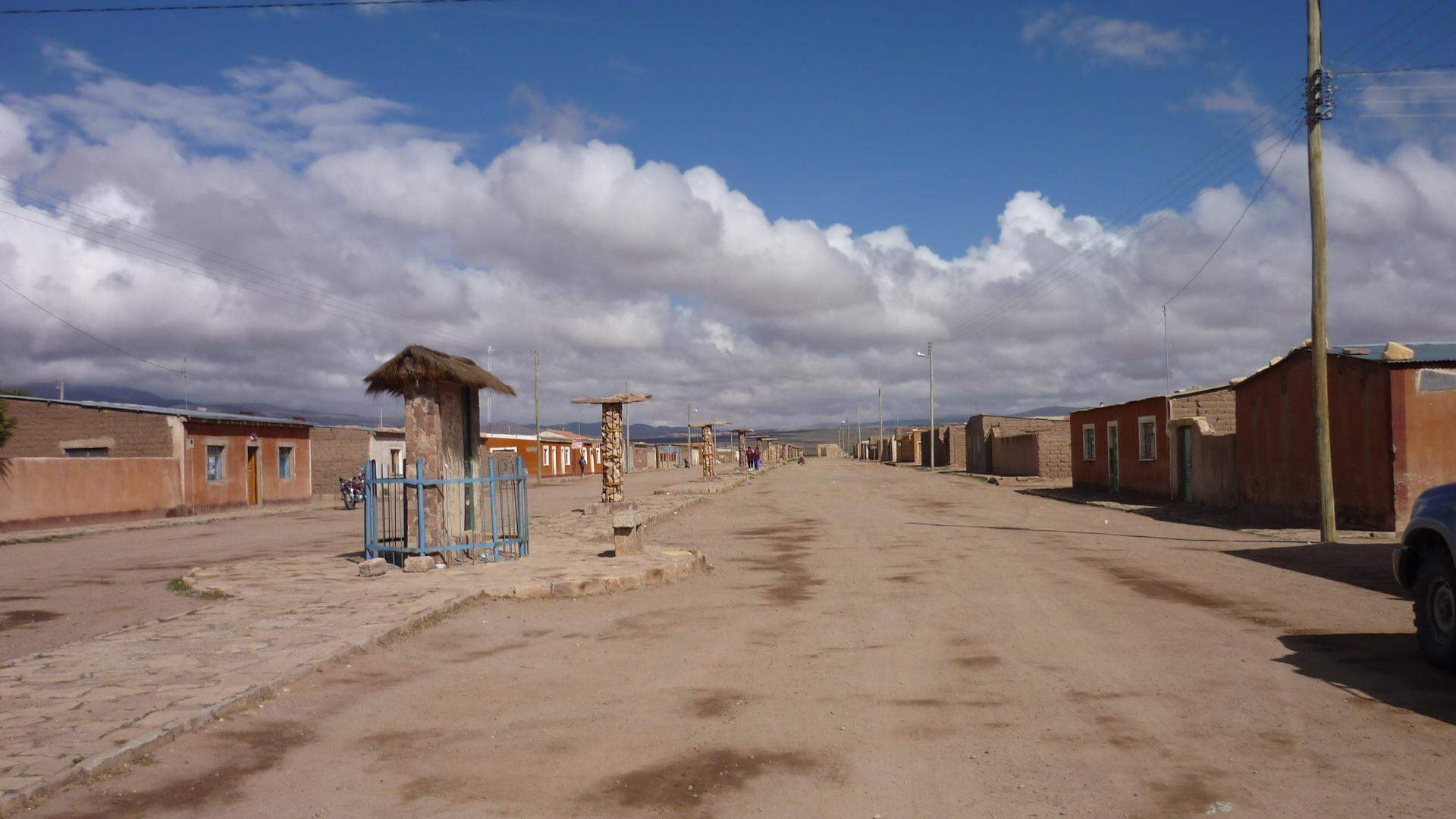 Vista de la calle central de Villa Alota, Municipio de San Agustín, Provincia de Enrique Baldivieso, departamento de Potosí